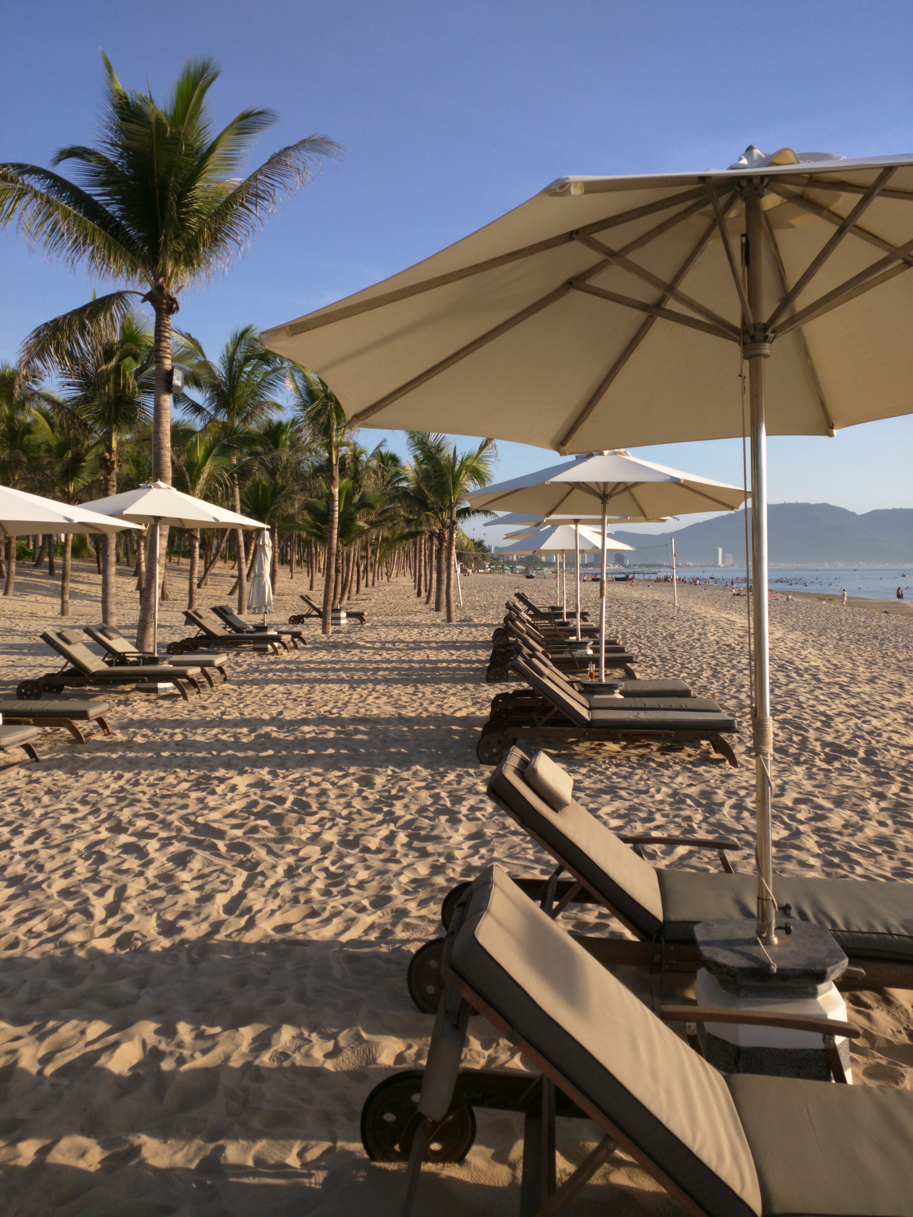 Mỹ An, Ngũ Hành Sơn, Đà Nẵng, Vietnam